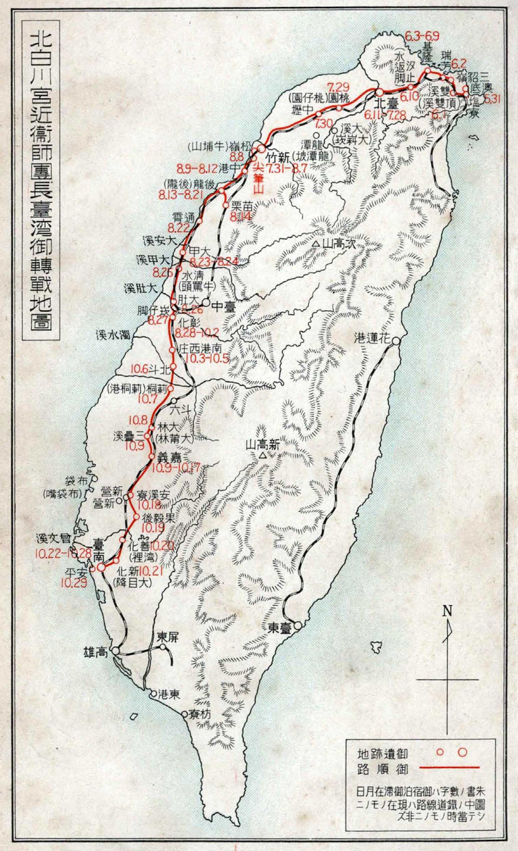 北白川宮能久攻台地圖（請注意，1895年戰時的鐵道路線並非圖中所示，那是1937年在繪製地圖時依當時完成的路線而繪。）